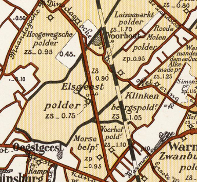 Elsgeest polder